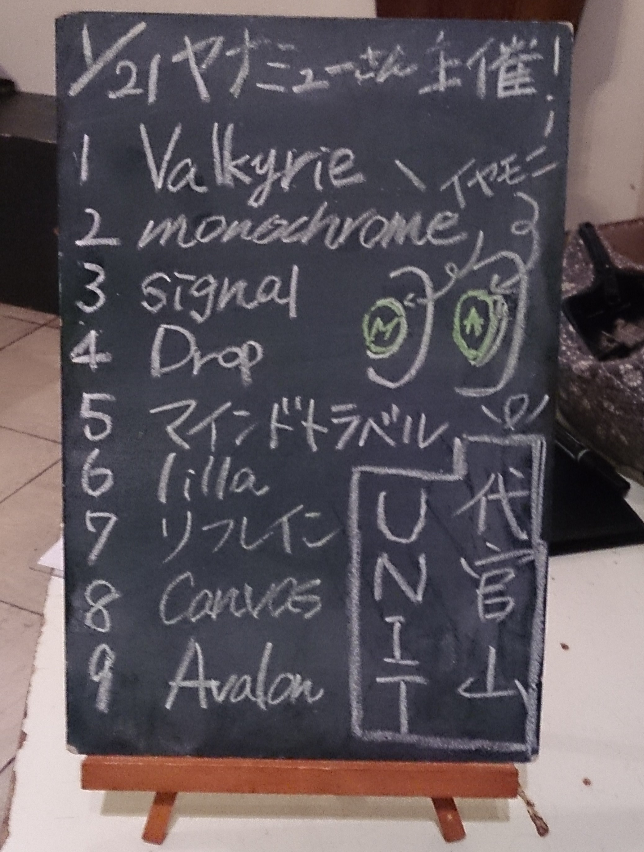 amiinAセトリボード(20180121(1))